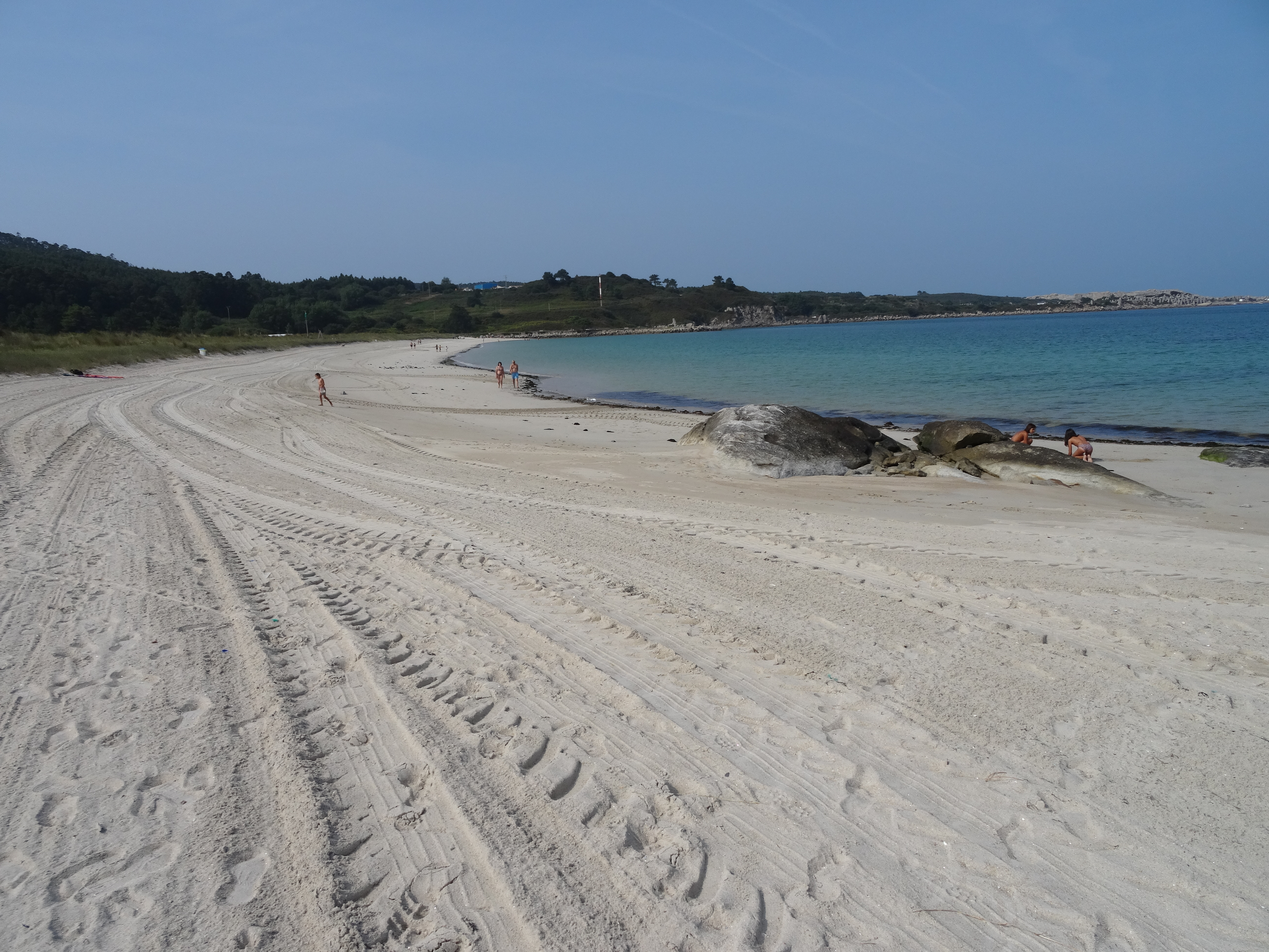 Ver título.